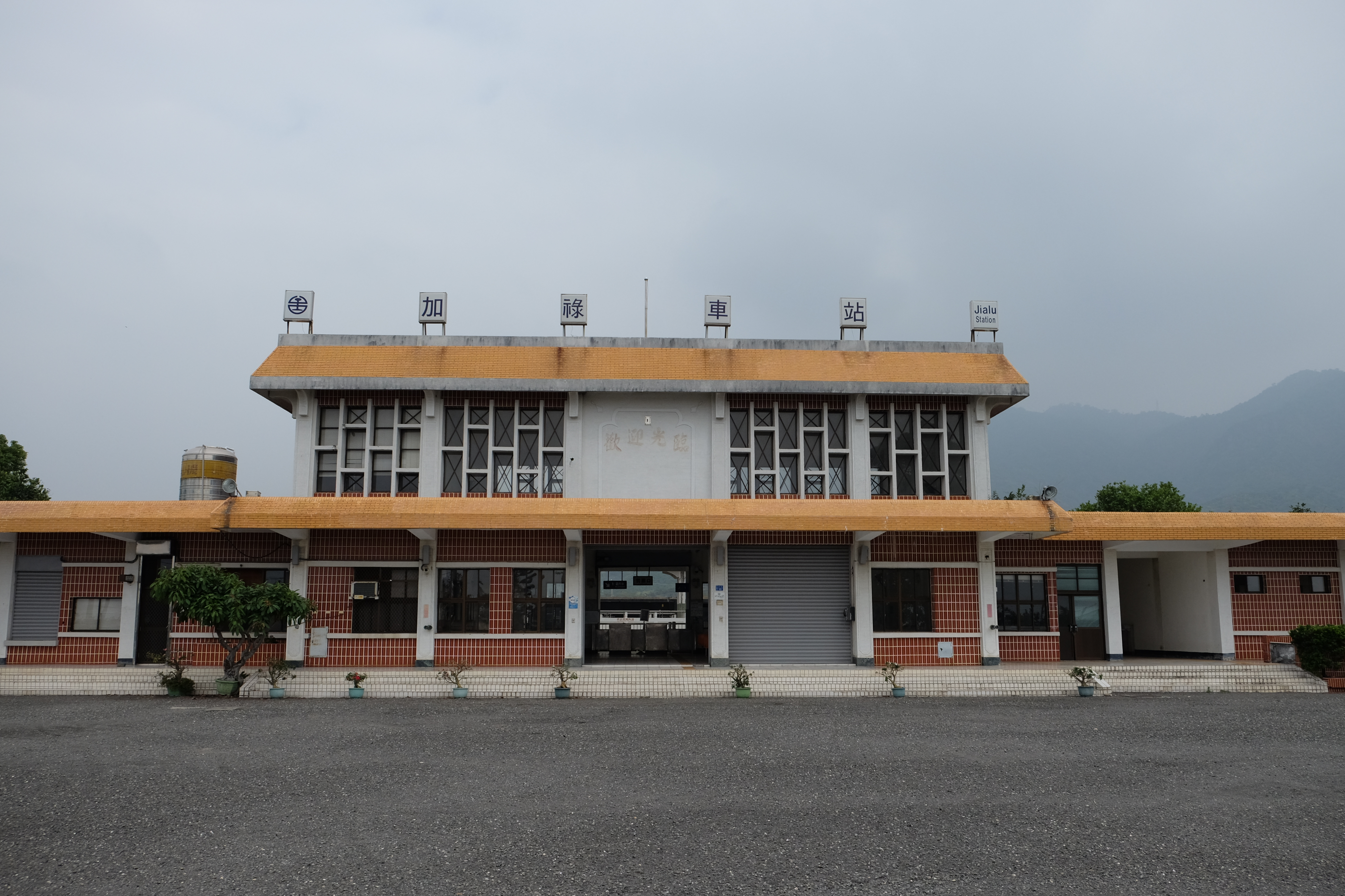 加祿火車站外觀